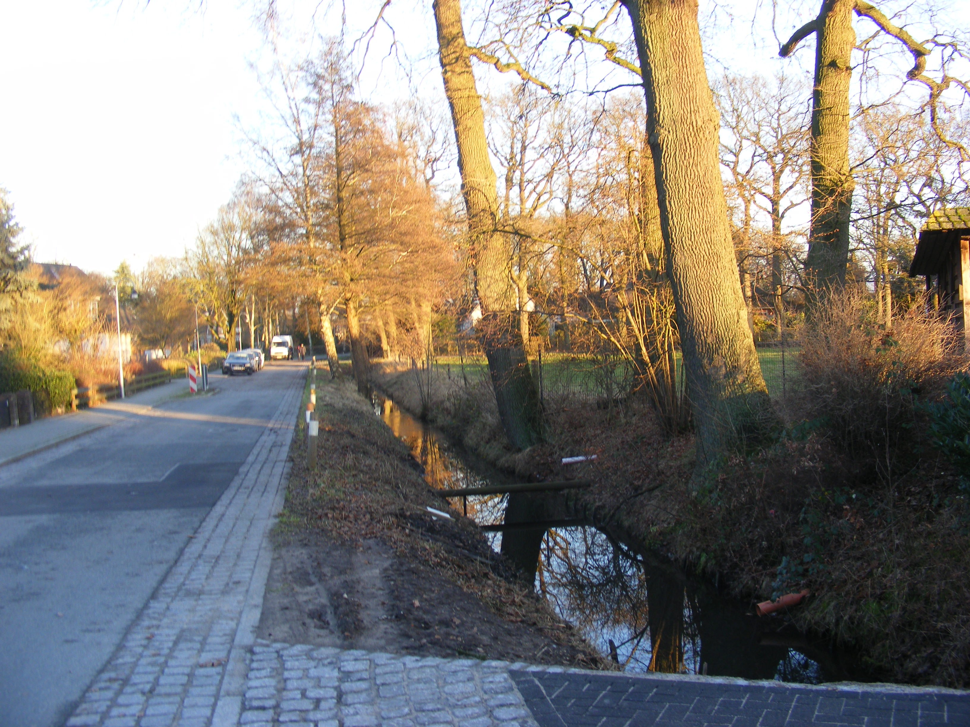 Holter Fleet (Quellbach der kleinen Wümme) an der Osterholzer Dorfstraße